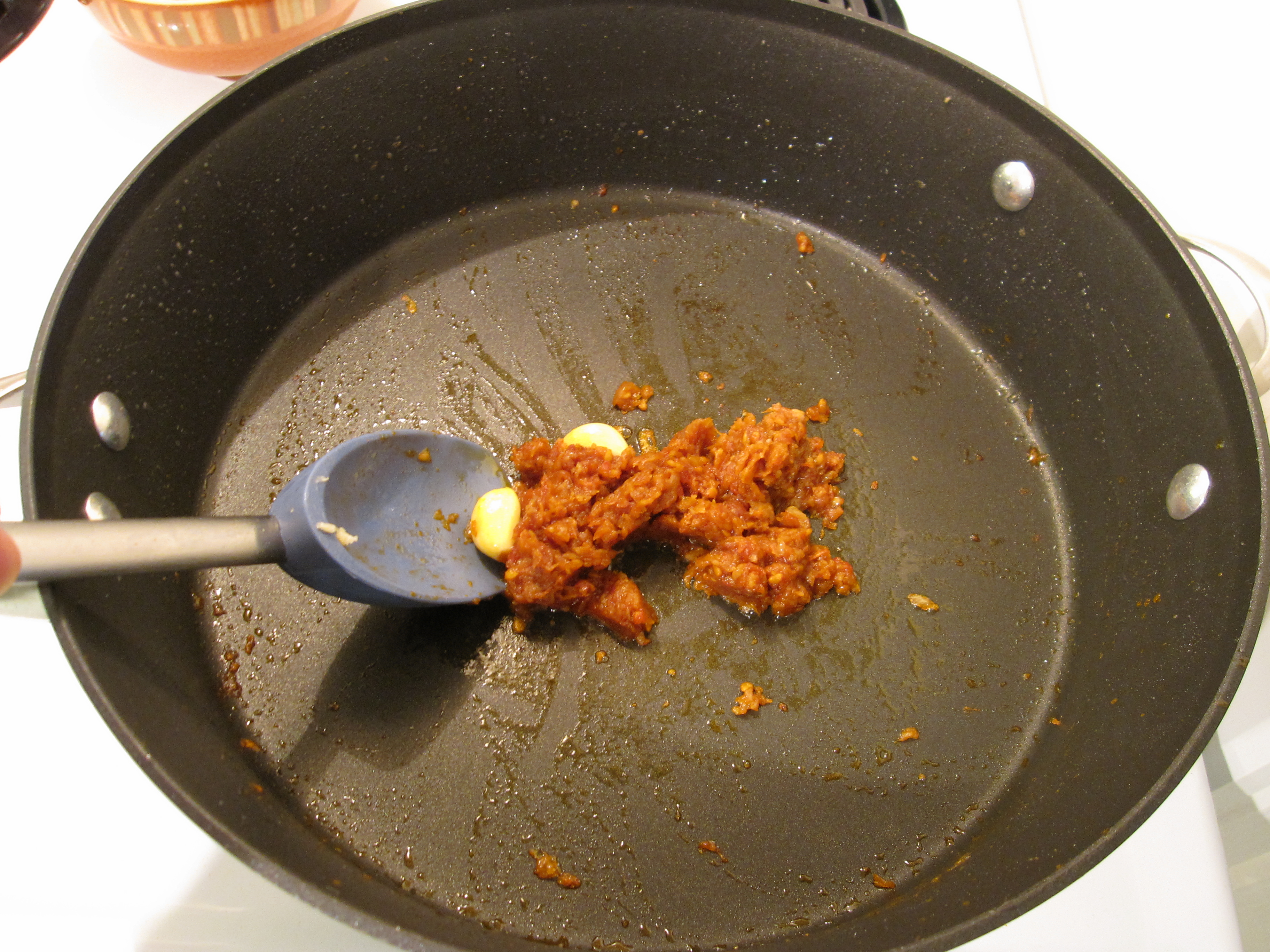 Paprizierter Ansatz bei der Zubereitung einer Sofrito-Würzsauce für Paella, hier papriziert mit süßem geräucherten spanischen Paprikapulver. (Weitere Zutaten: Öl, Zwiebeln, Tomaten und Knoblauch.)